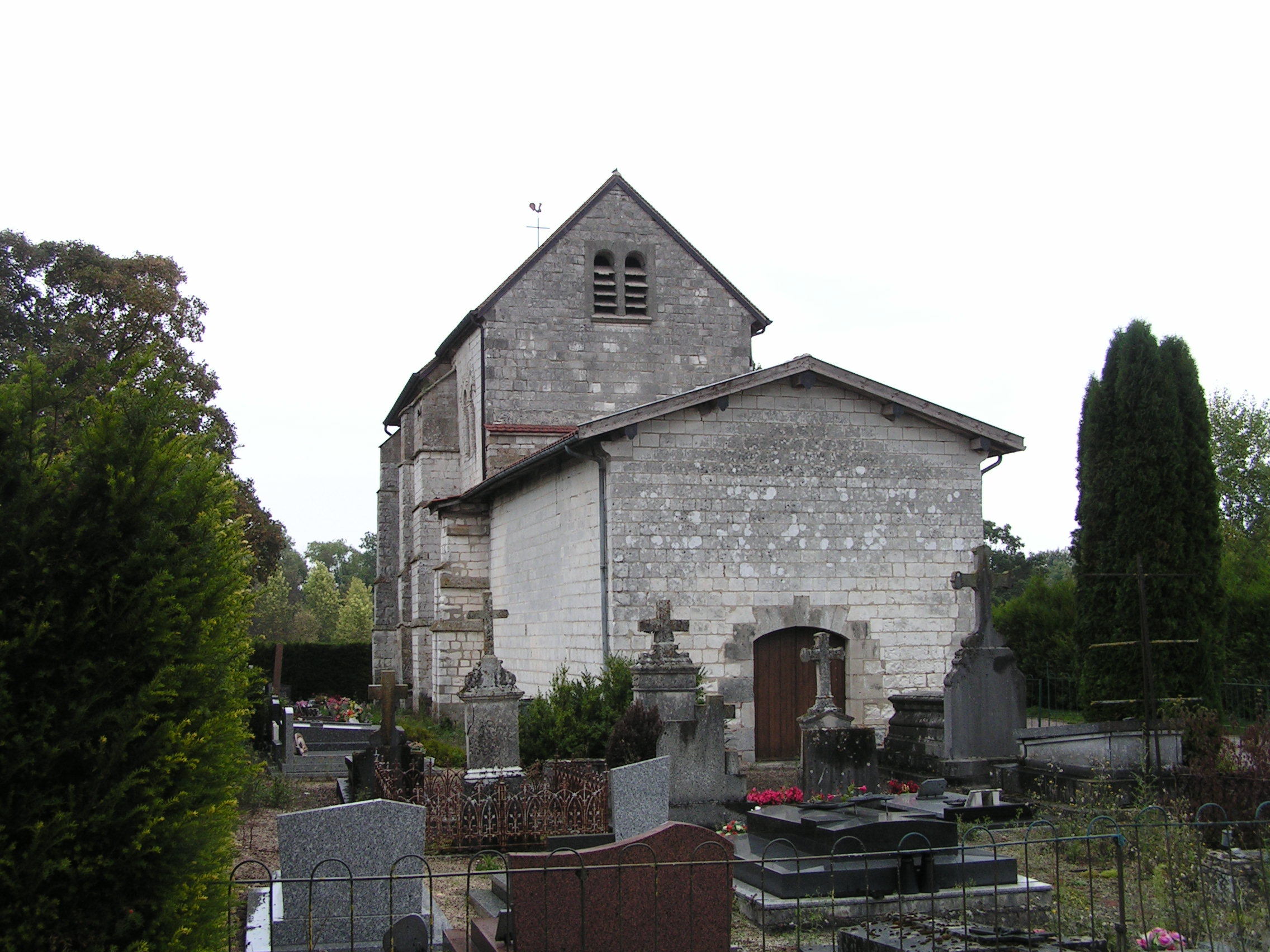 Église Notre-Dame de Faux-sur-Coole (Inscrit) .